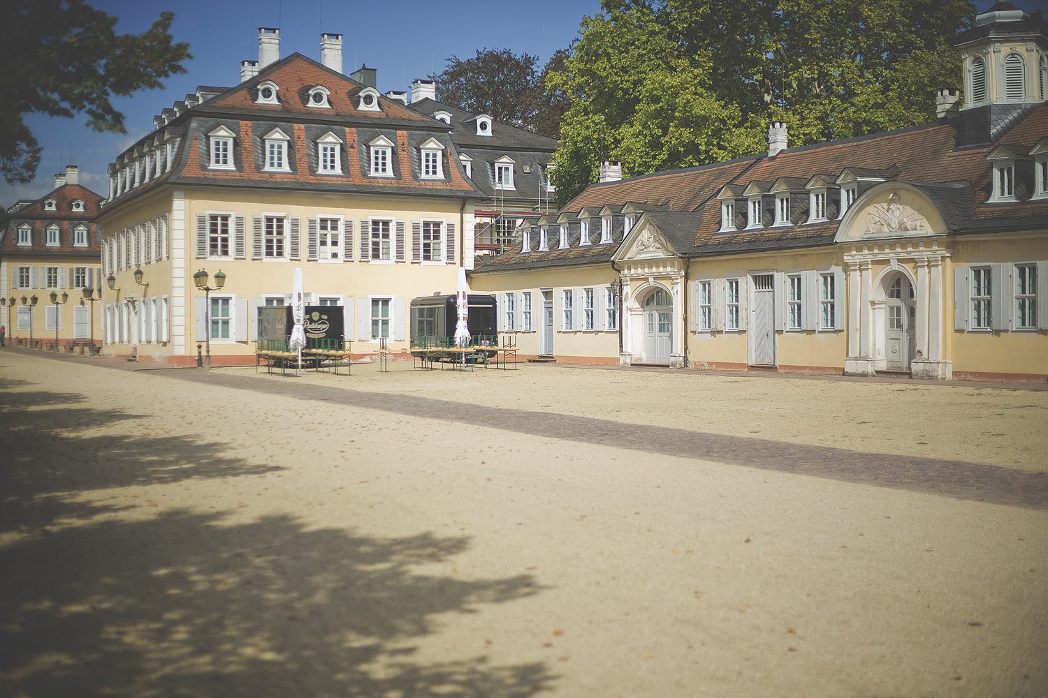 Die Kuranlage von Wilhelmsbad, errichtet im klassizistischen Stil.